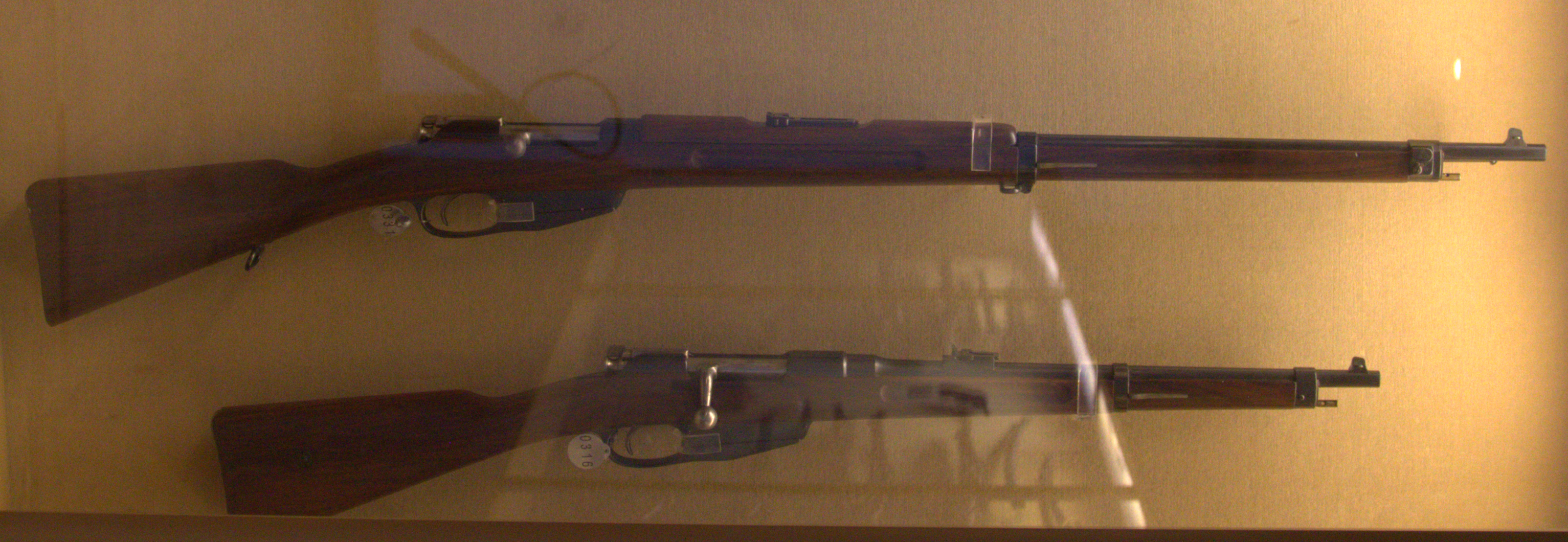 Puška in karabinka Mannlicher Model 1893, izdelana v Steyrju, v Avstriji za Romunijo.